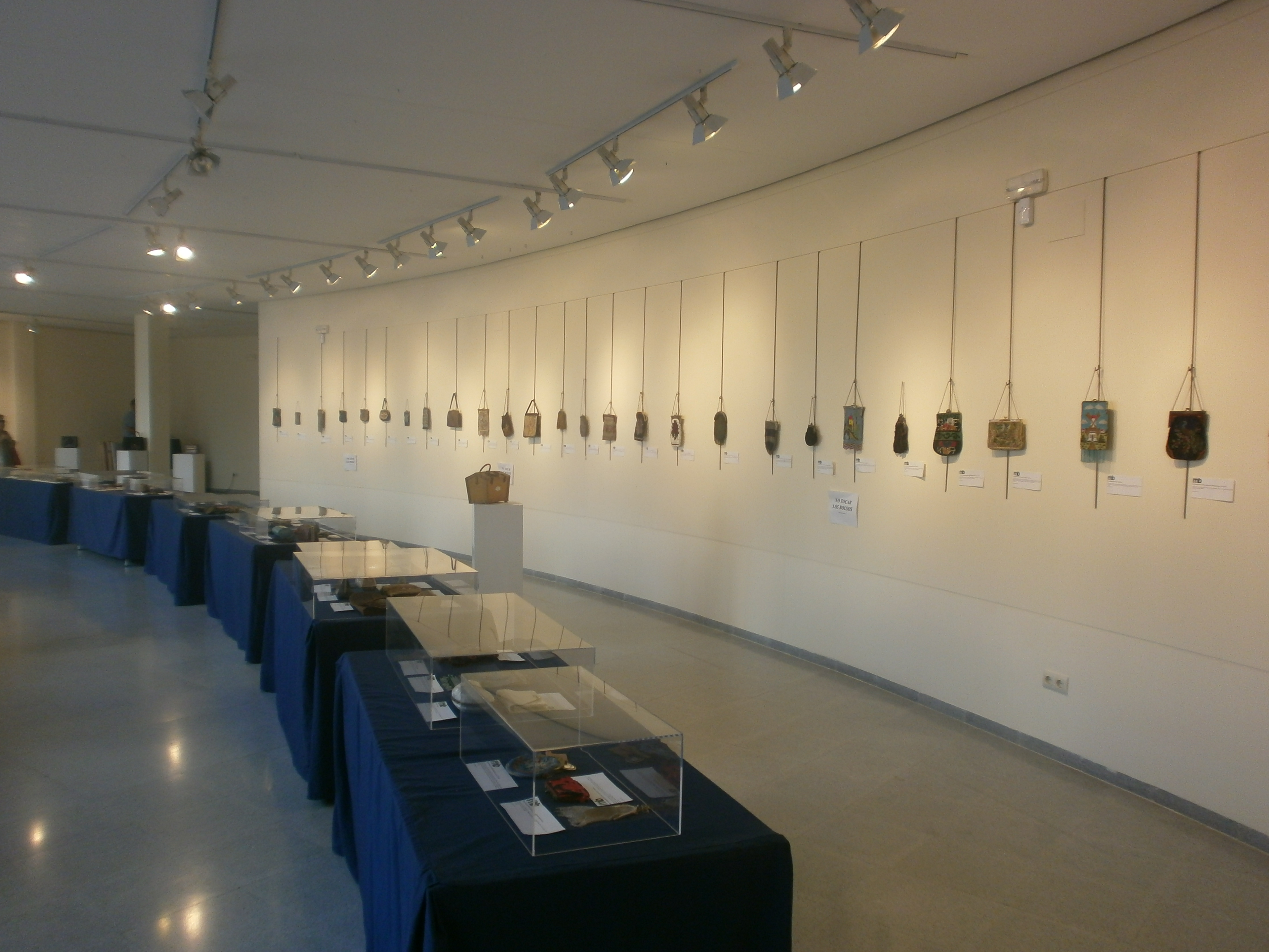 Celebrada en la Casa de Cultura de la población de El Campello en Septiembre de 2011